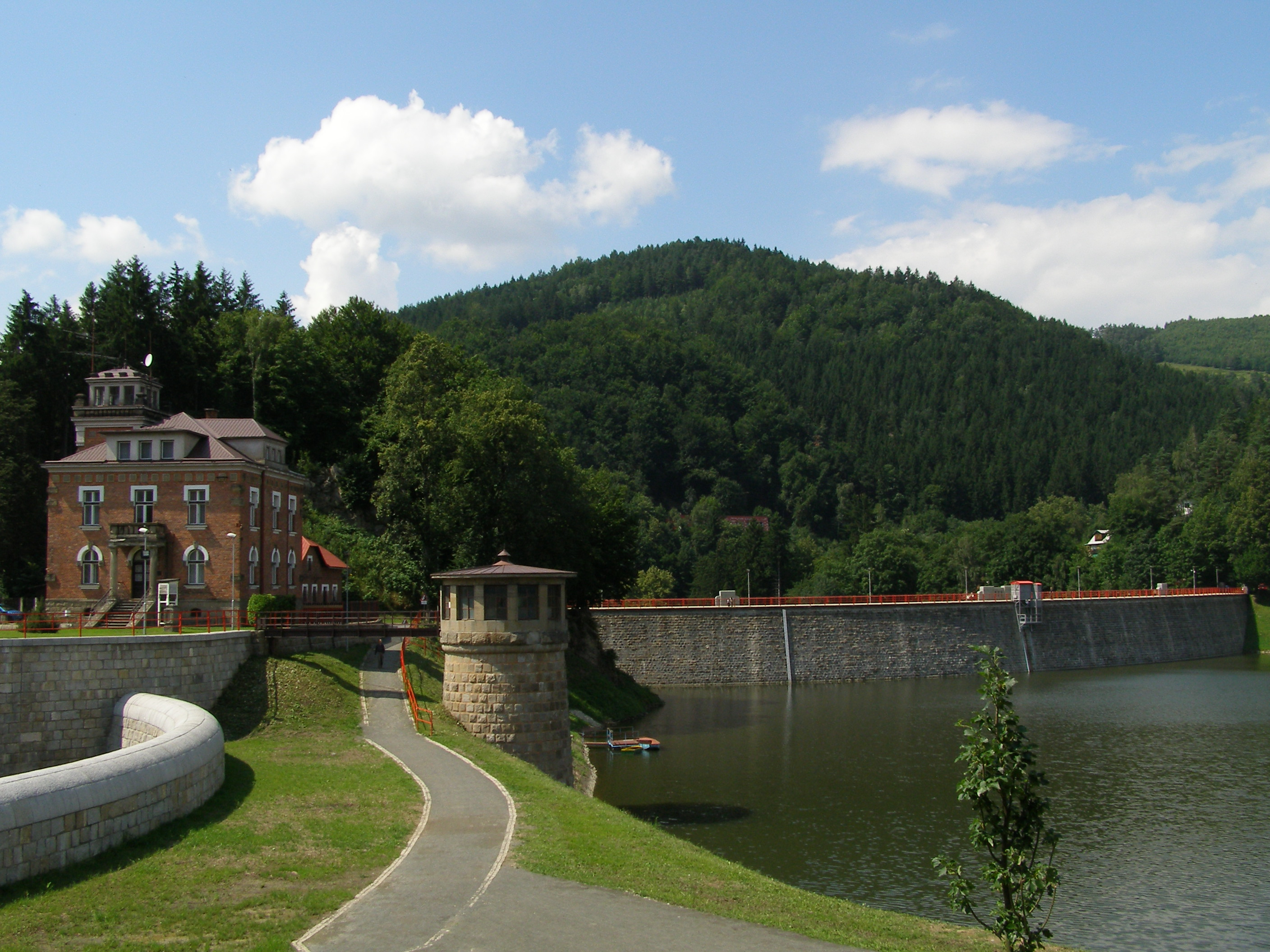 Přehrada Bystřička, s omezením: bez kaskádovévo přelivu, zklidňovací nádrže, dvou mostů přes kaskádový přeliv a pozemku parc. č. 866/1 (Bystřička), Bystřička